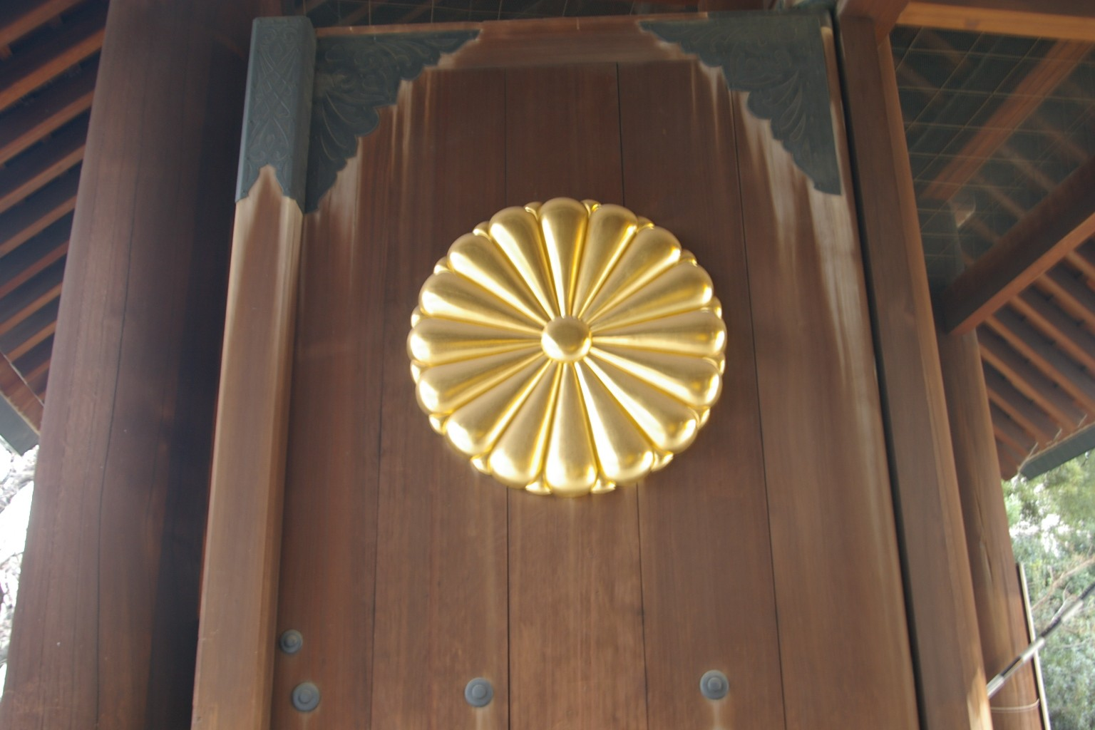 菊の御紋章